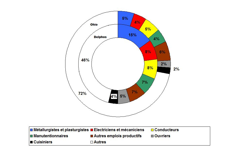 Principaux emplois de la population masculine de Delphos (Ohio - Etats-Unis) en 2009